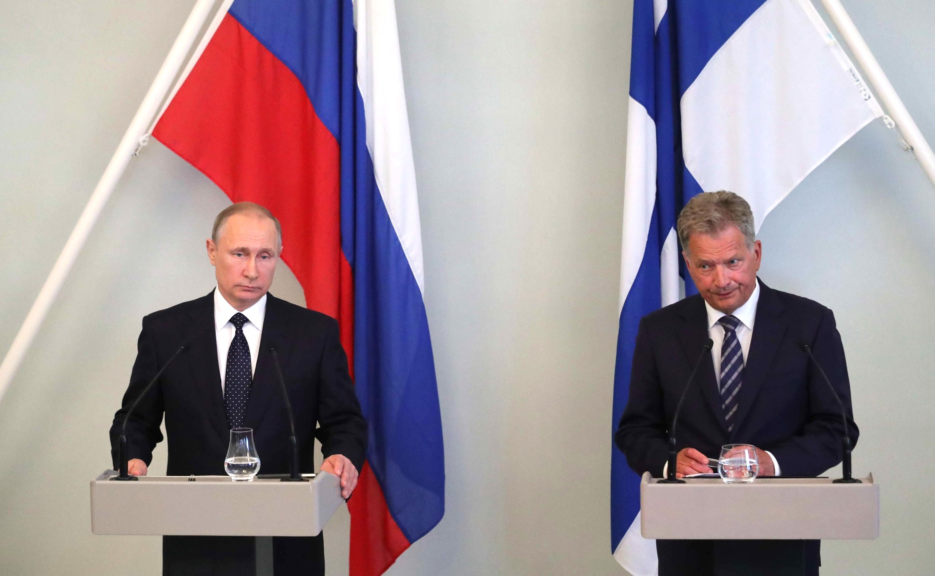 Совместная пресс-конференция Президента России Владимира Путина и Президента Финляндии Саули Ниинистё. Пункахарью